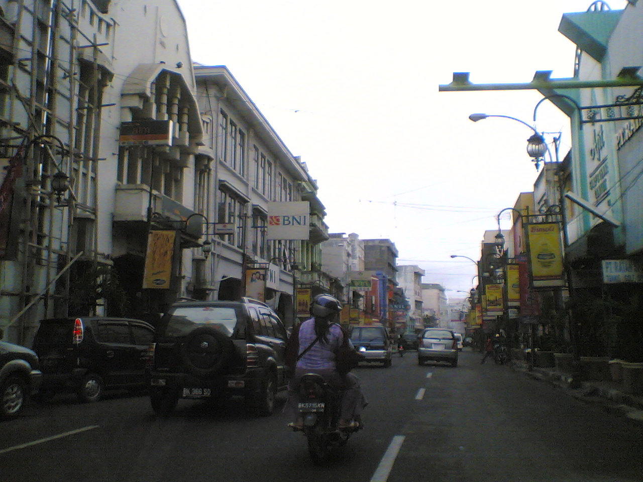 Kesawan area in Medan, Indonesia. Photo taken on December 2006.